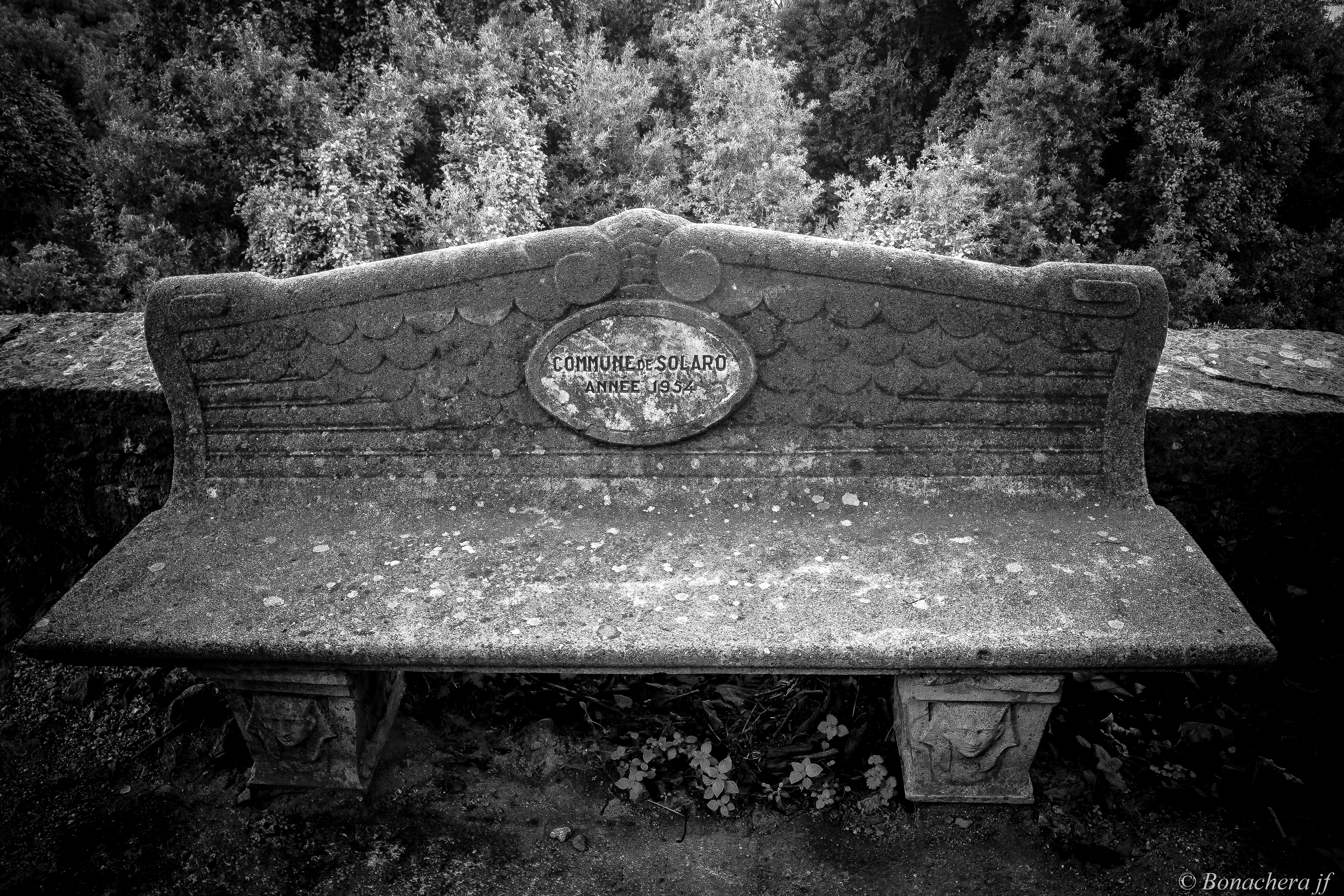 Un banc dans le rues du village